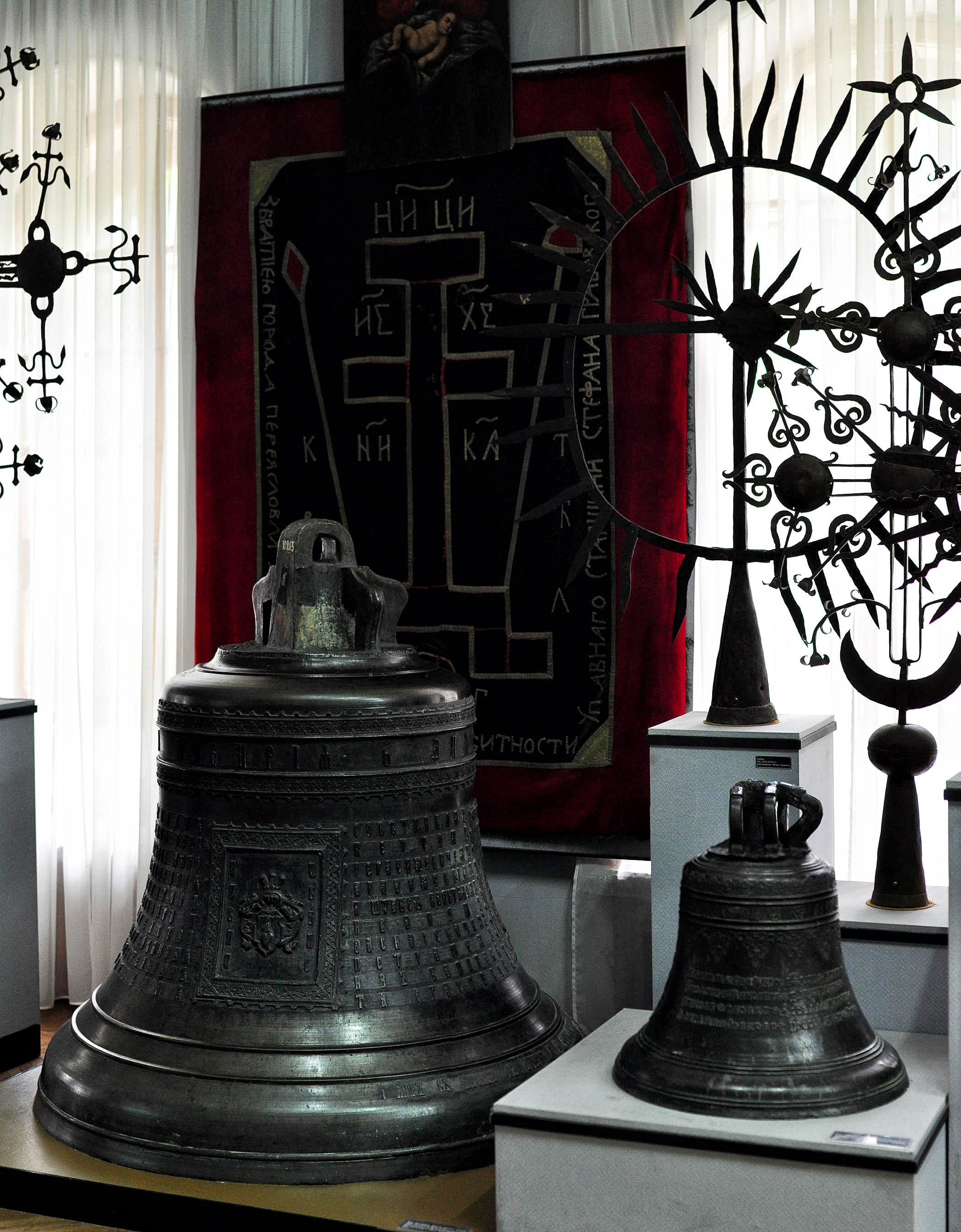 Dzwon Kyzy-Kermen. Autor Afanasij Petrowycz. 1695 r. Region Połtawy. Metal.